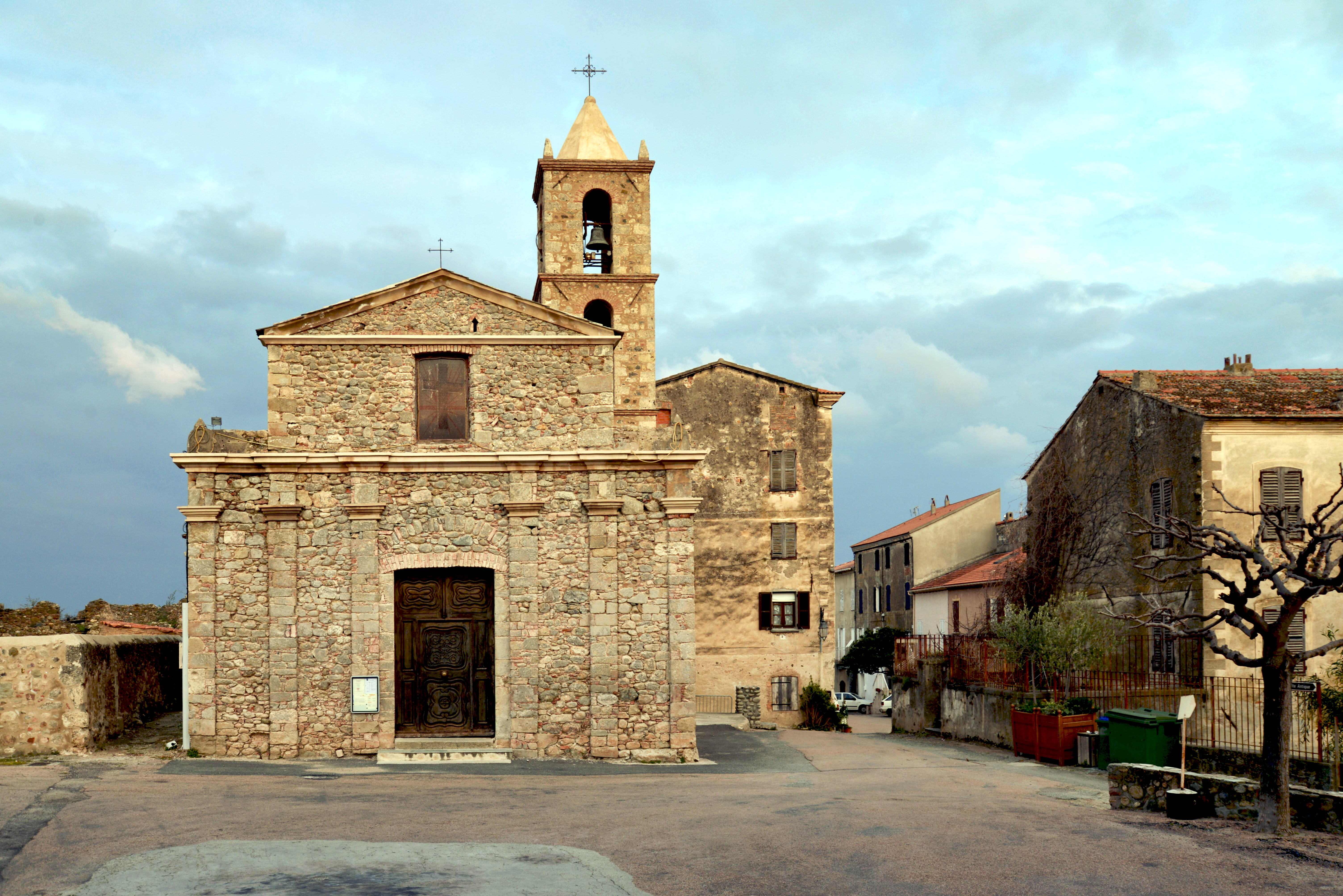 Aléria, Haute-Corse - L'église Saint-Marcel, du XVe siècle, inscrite aux monuments historiques .